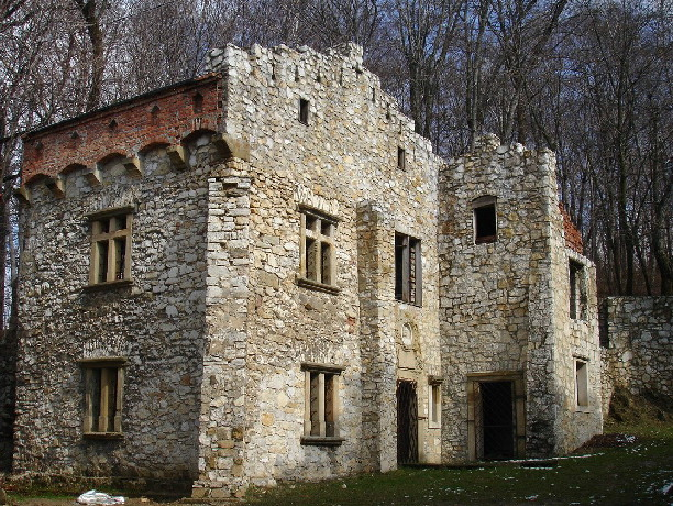 The Frankiwicz Tower. The neo-Gothic detailing on the Frankiewicz Palace in Młoszowa, Poland